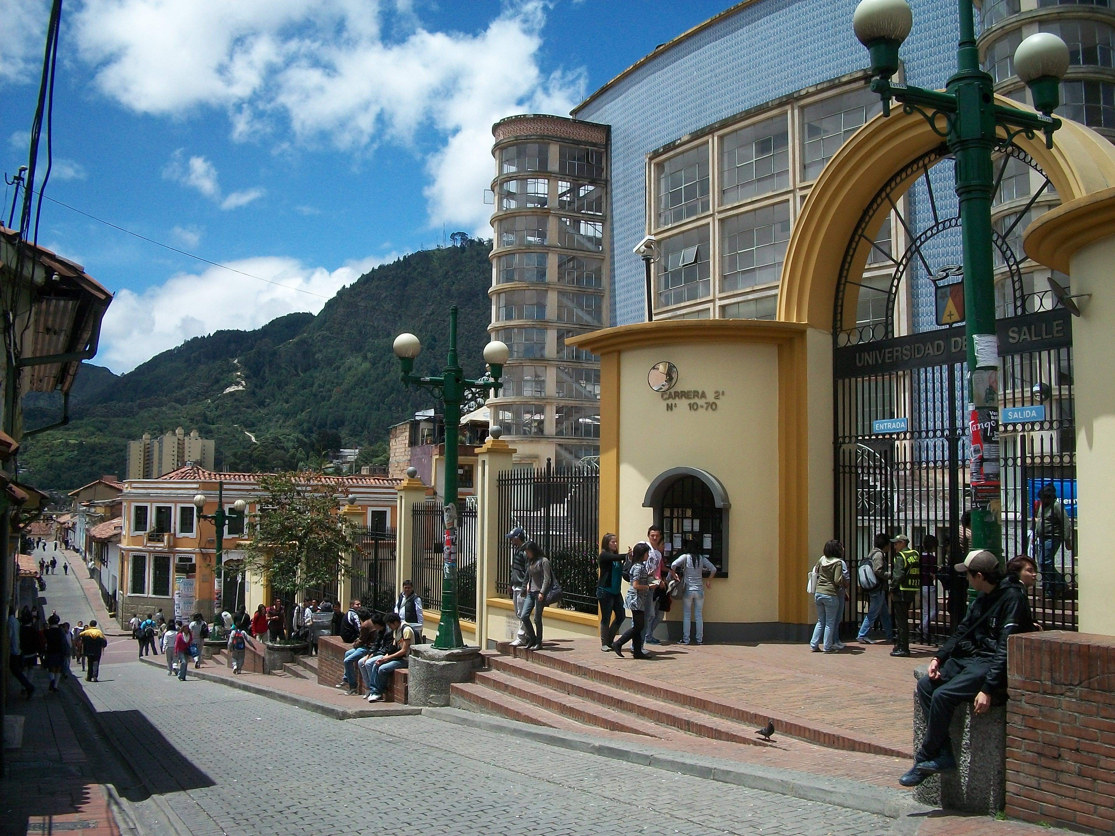 Entrada de la Universidad de La Salle, sede La Candelaria, Cra. 2 No. 10 70, Bogotá D. C., Colombia. Al fondo, cerro de Monserrate.